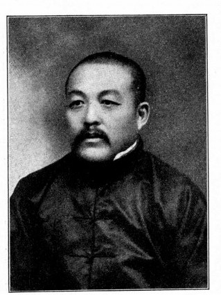 中文（台灣）: 王蔭棠議員